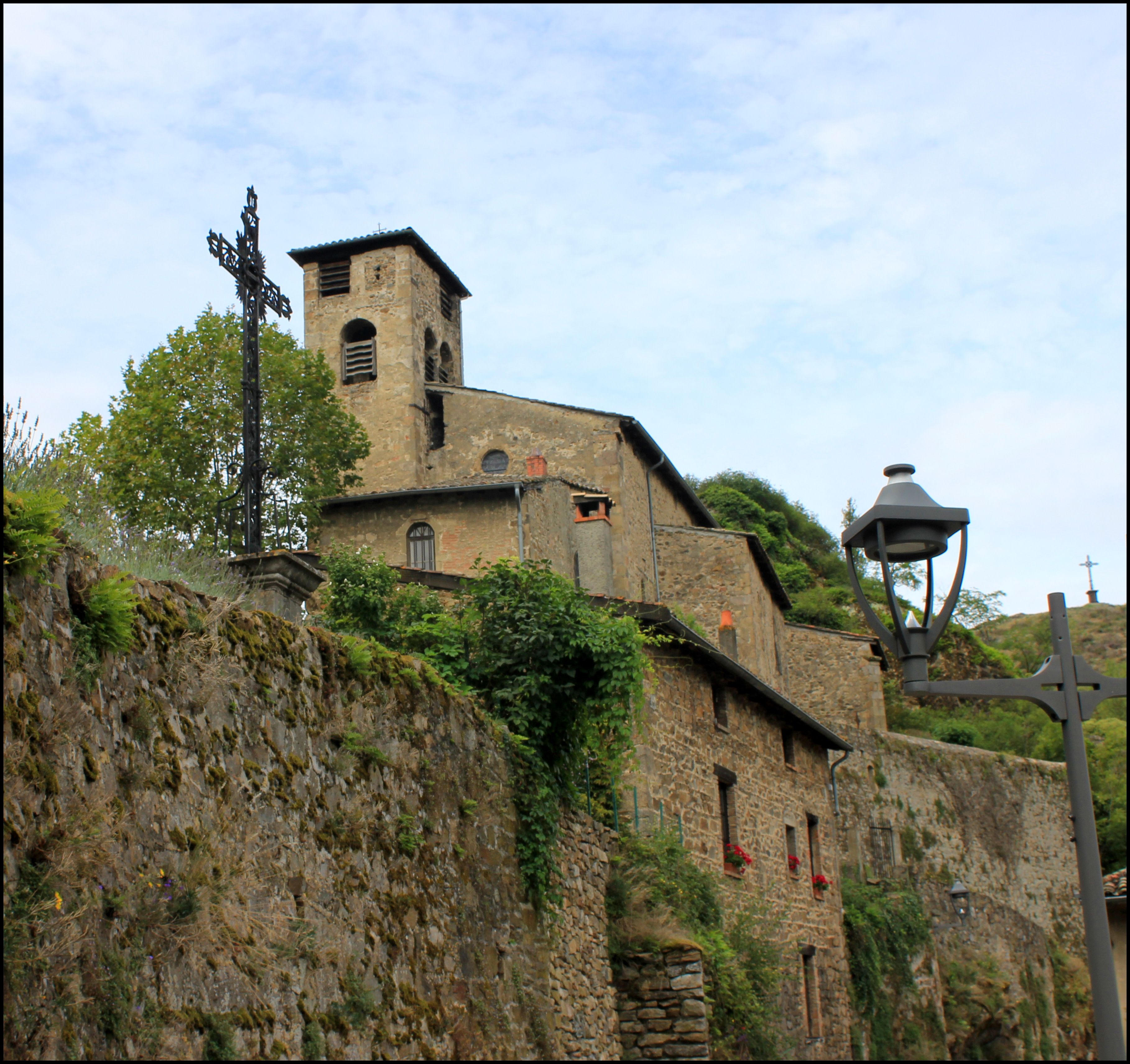 Village de Malleval (Loire)